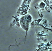 Parasite tiré du biofilm d'un patient atteint d'une parodontite chronique active. Microscope a contraste de phase, grossissement 1000x, sous frottis salivaire